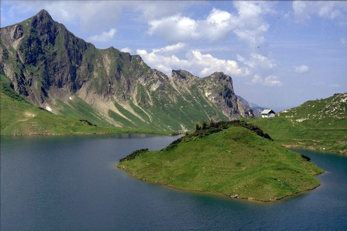 Aelpelekopf mit Schrecksee